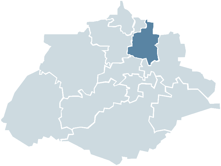 Munisipio de Tepezala